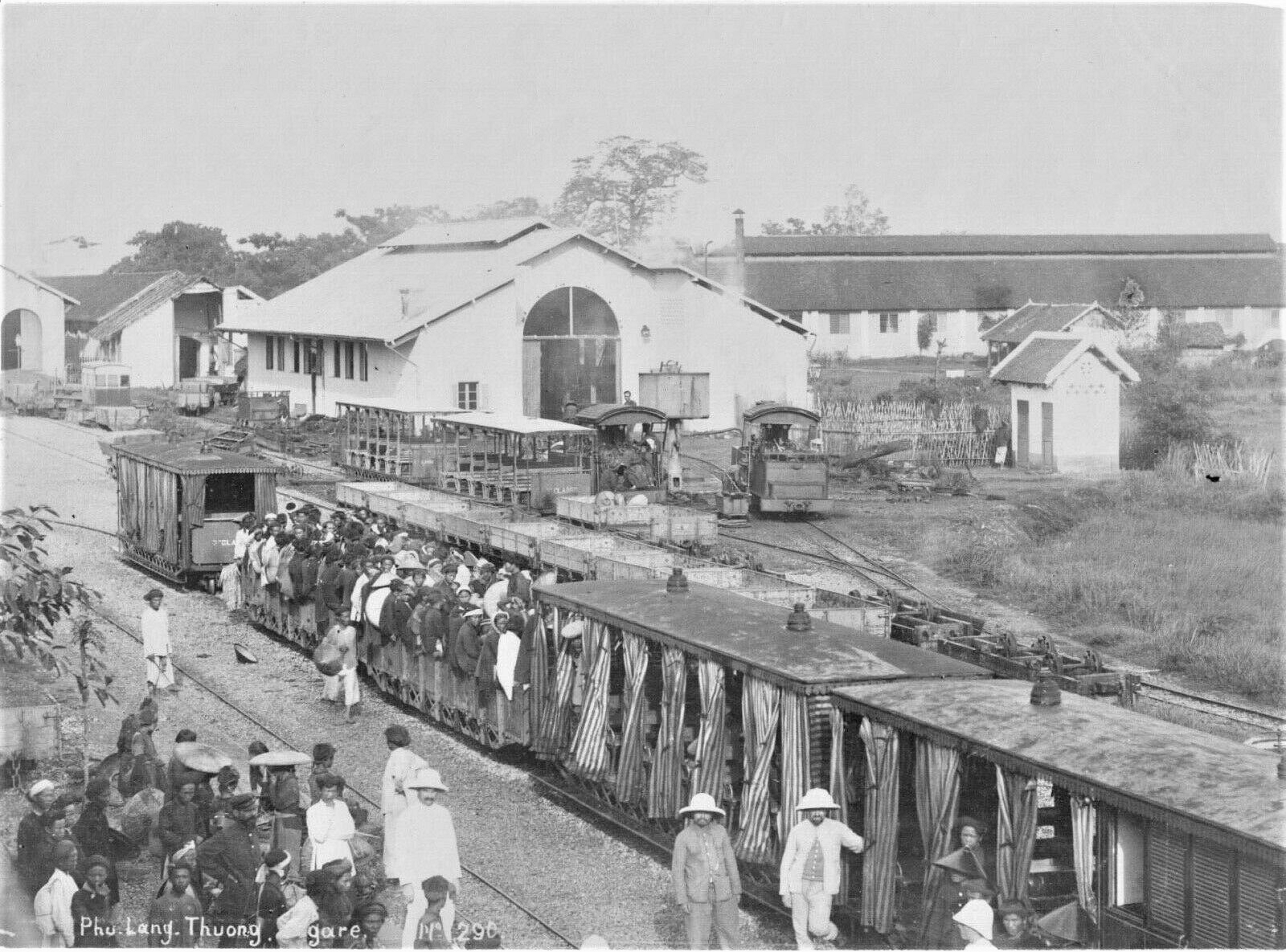 600mm gauge, Vietnam